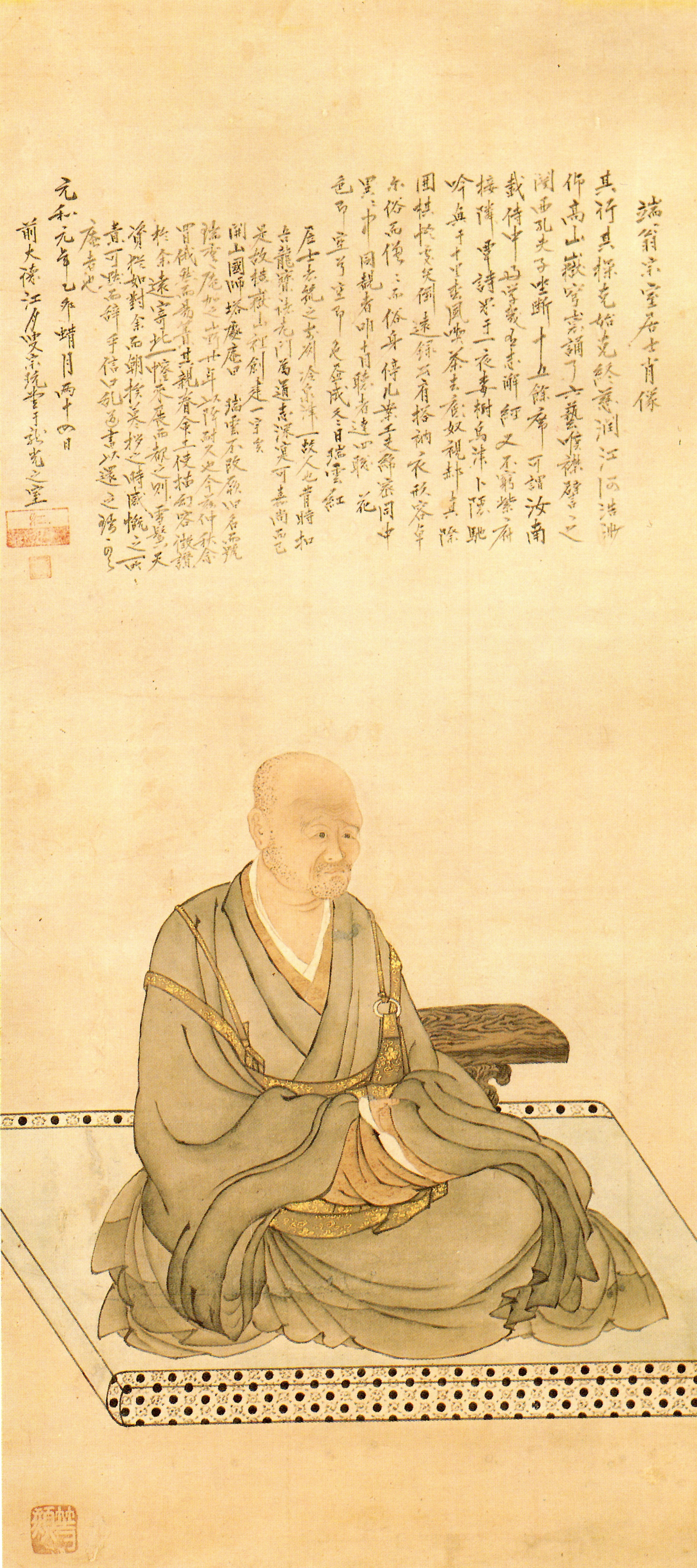 嶋井宗室の肖像。